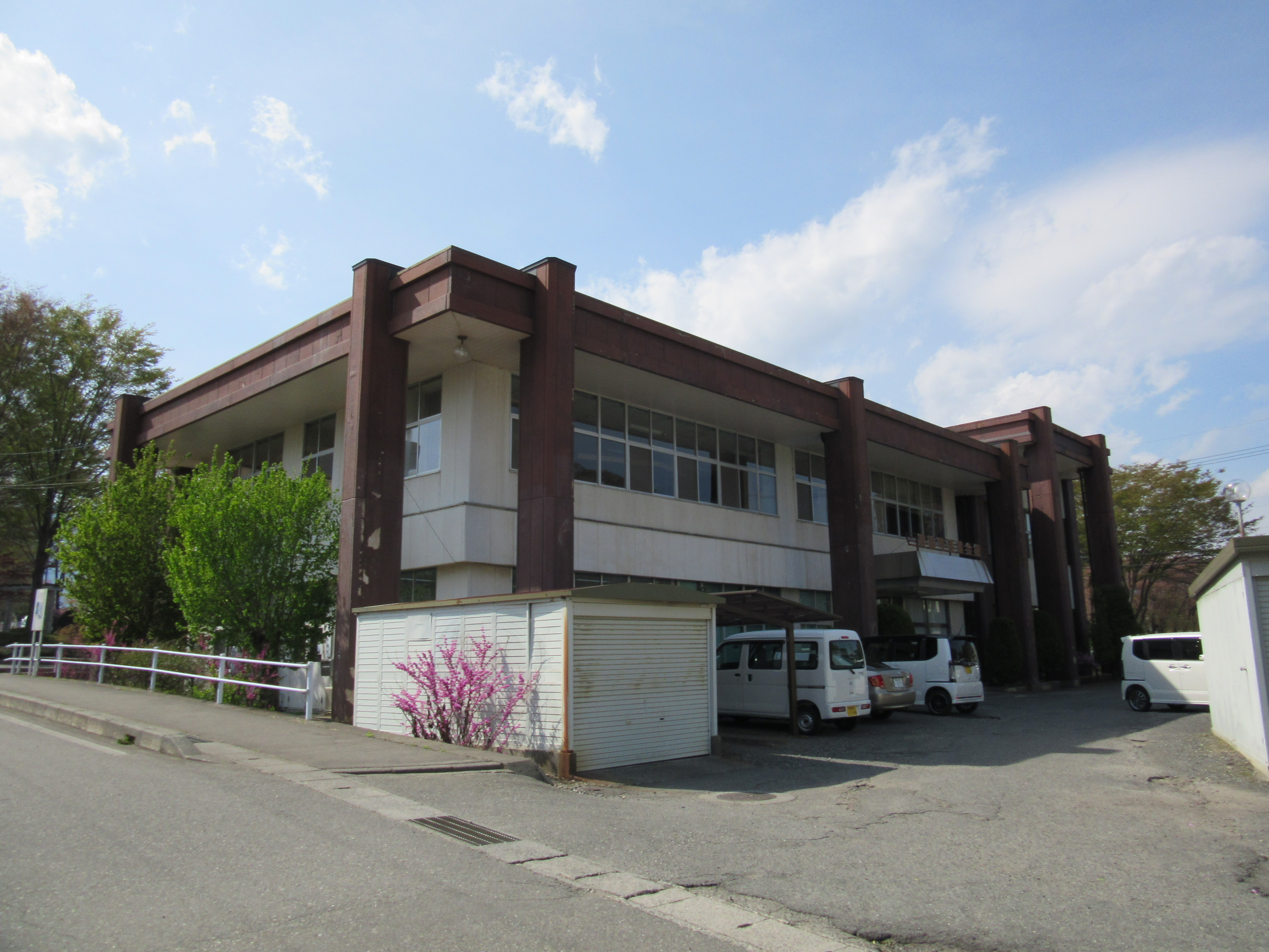 箕輪町産業会館